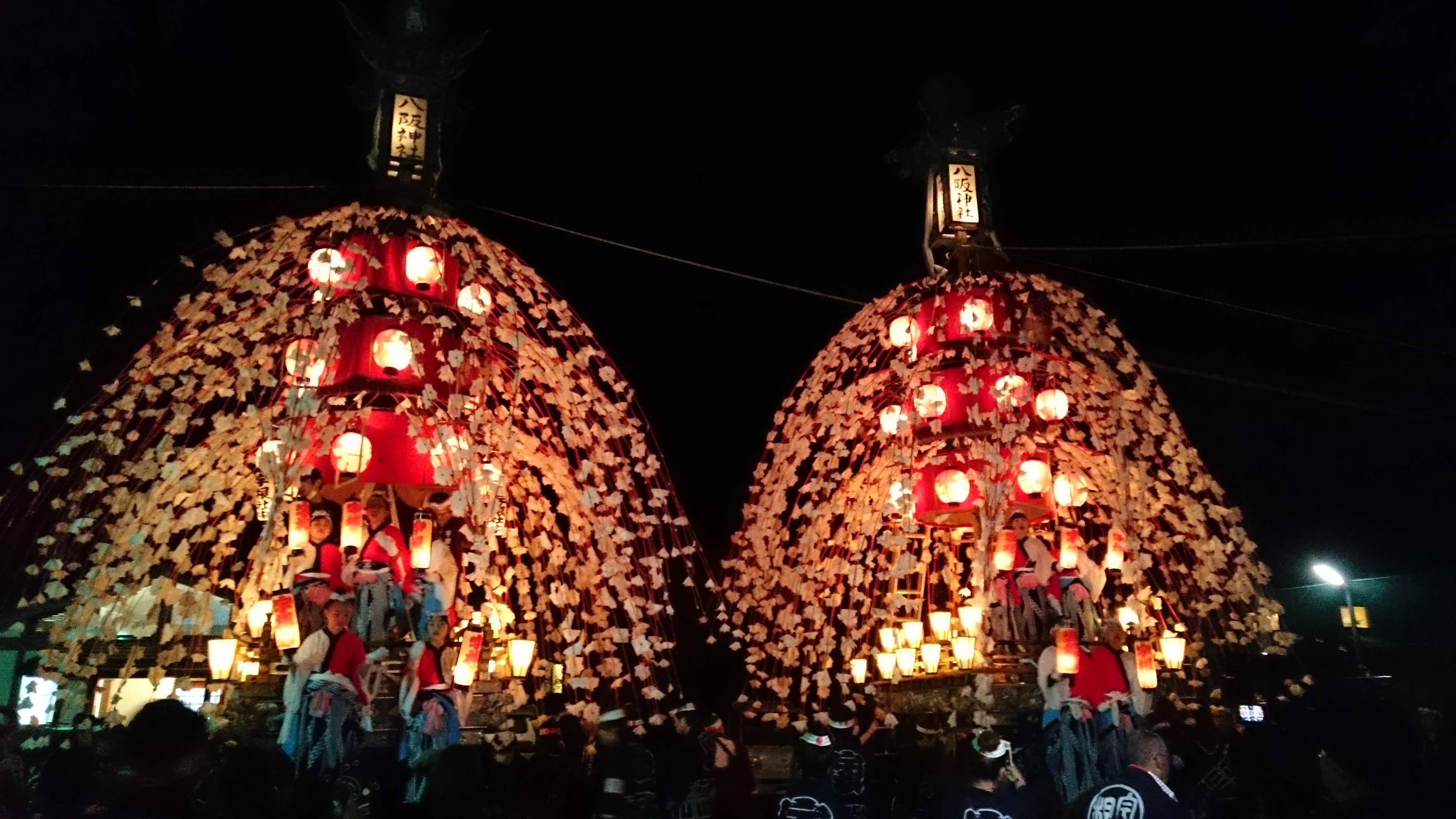 宇根の山車